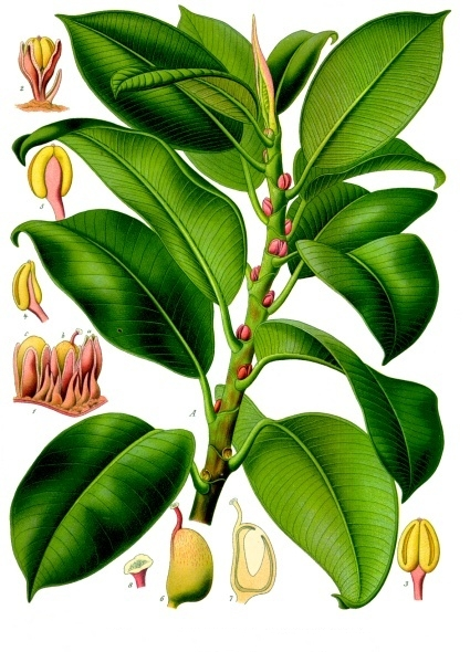 Gummibaum. A Zweig mit Scheinfrüchten. 1 Ein Stück aus dem Blütenkuchen; a geschlossene männliche Blüte; b weibliche Blüte; c Frucht; 2 geöffnete männliche Blüte; 3 Staubblatt von vorn; 4 dasselbe von der Seite; 5 dasselbe vorn Rücken aus gesehen; 6 Fruchtknoten; 7 derselbe längsdurchschnitten; 8 Narbe. A verkleinert, 1 bis 8 stark vergrössert.